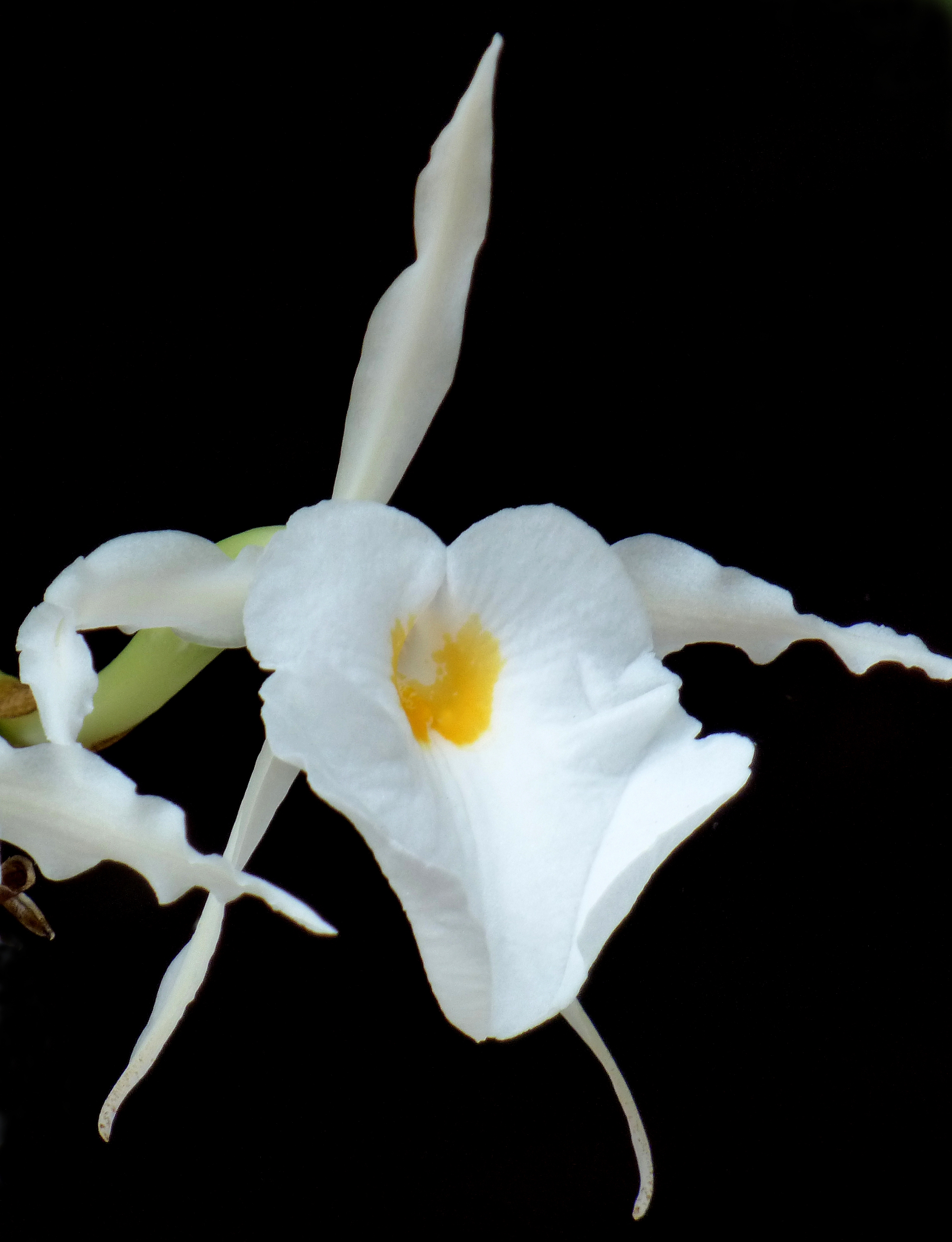 Trichopilia fragrans